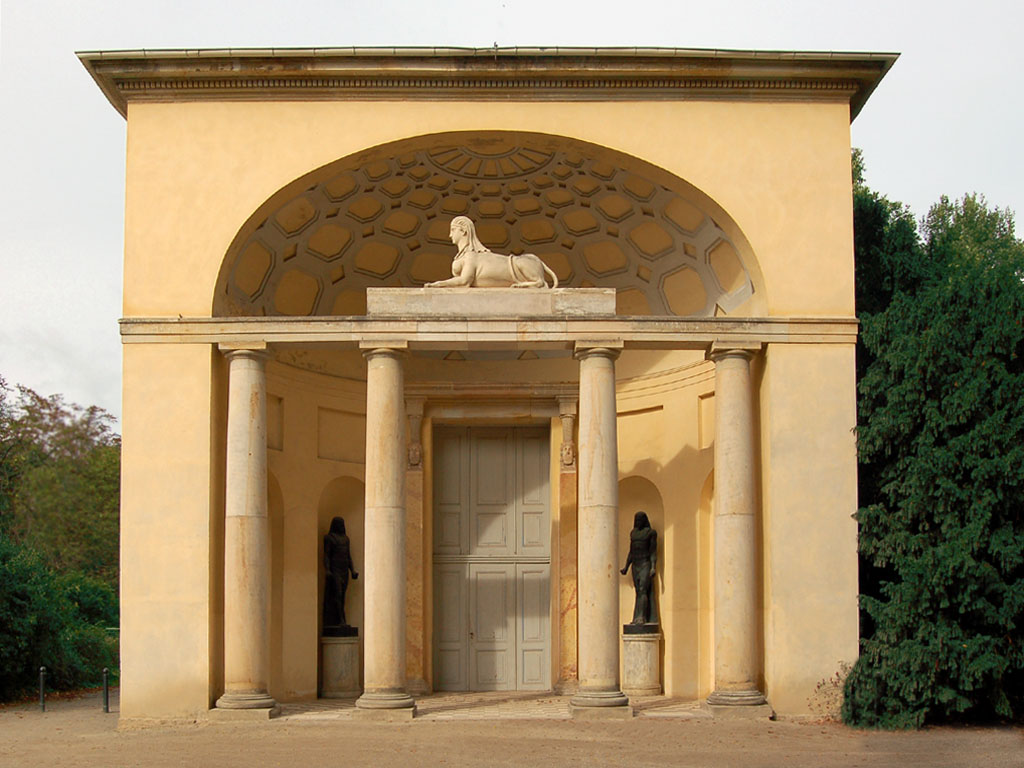 Antikenportal (ägyptisch) an der Orangerie im Neuen Garten in Potsdam